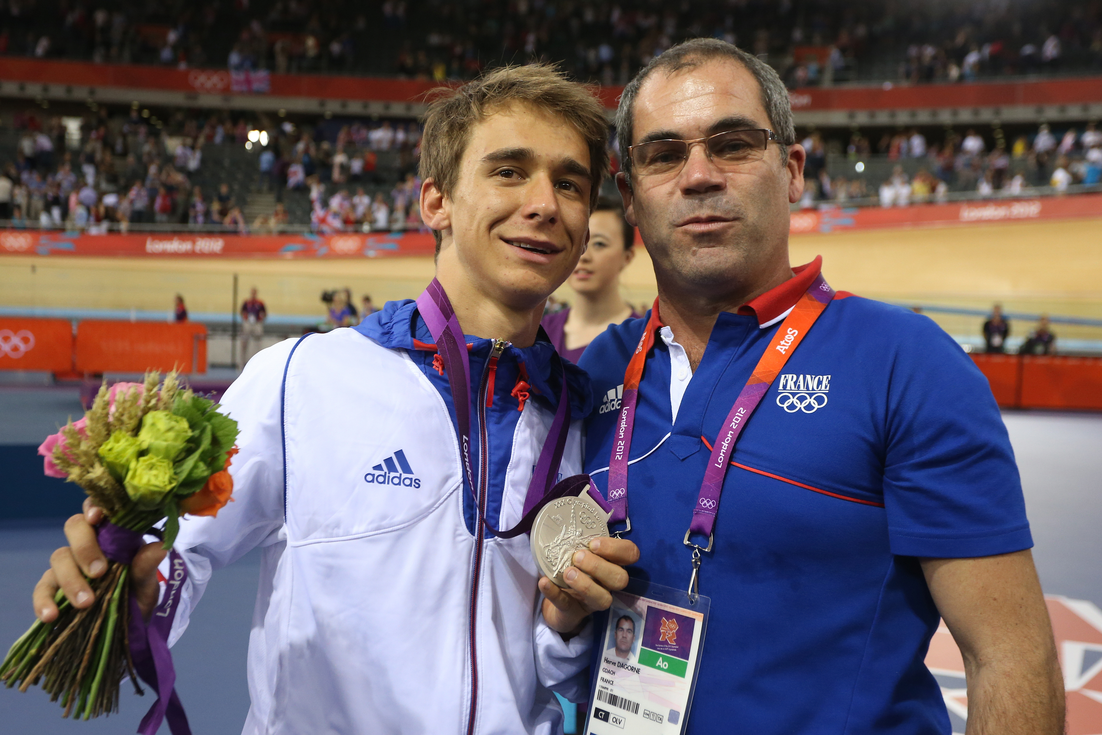 Bryan COQUARD silver medal and his coach Herve DAGORNE